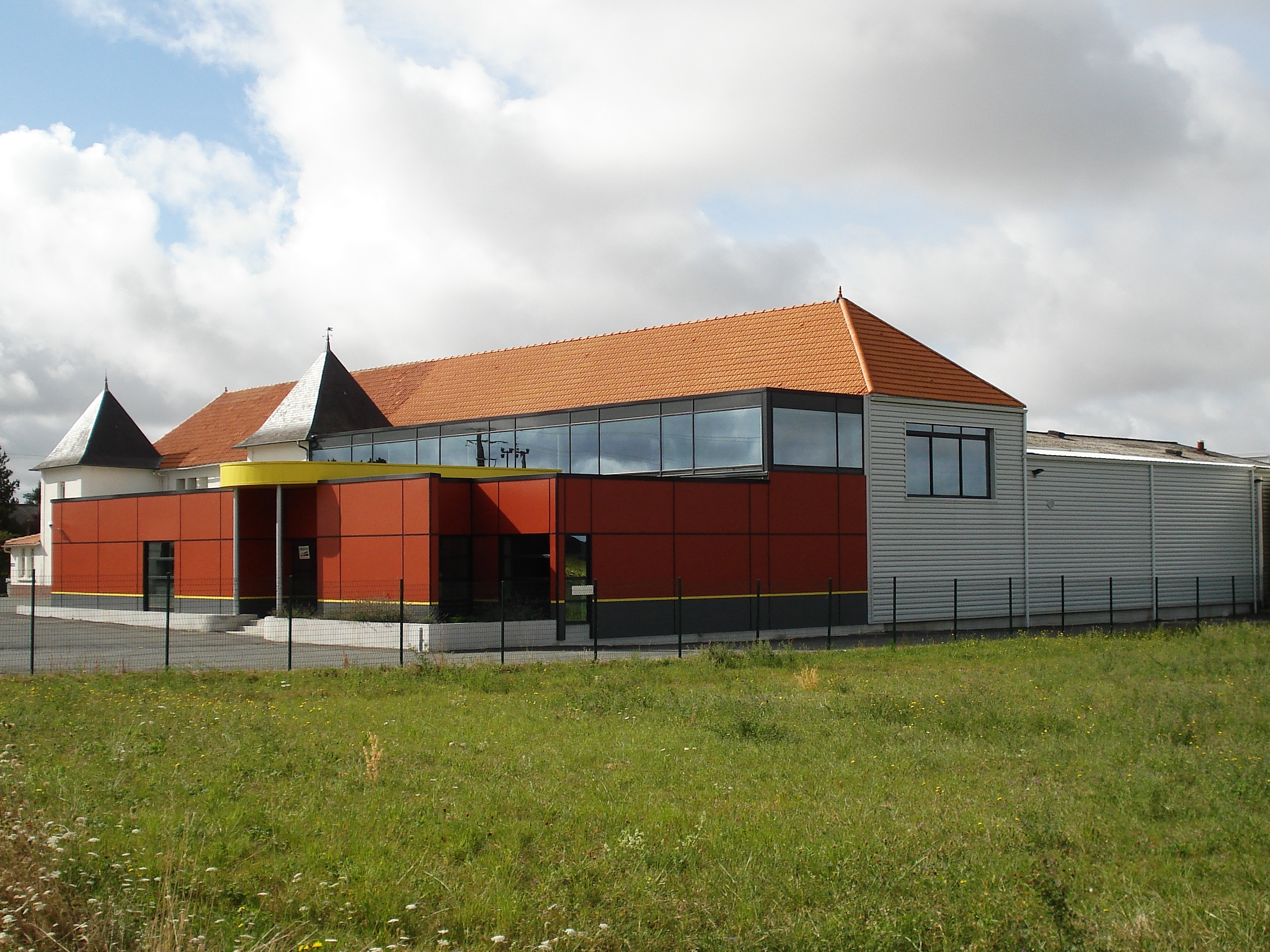 L'usine Nérévia de Néré en Charente-Maritime